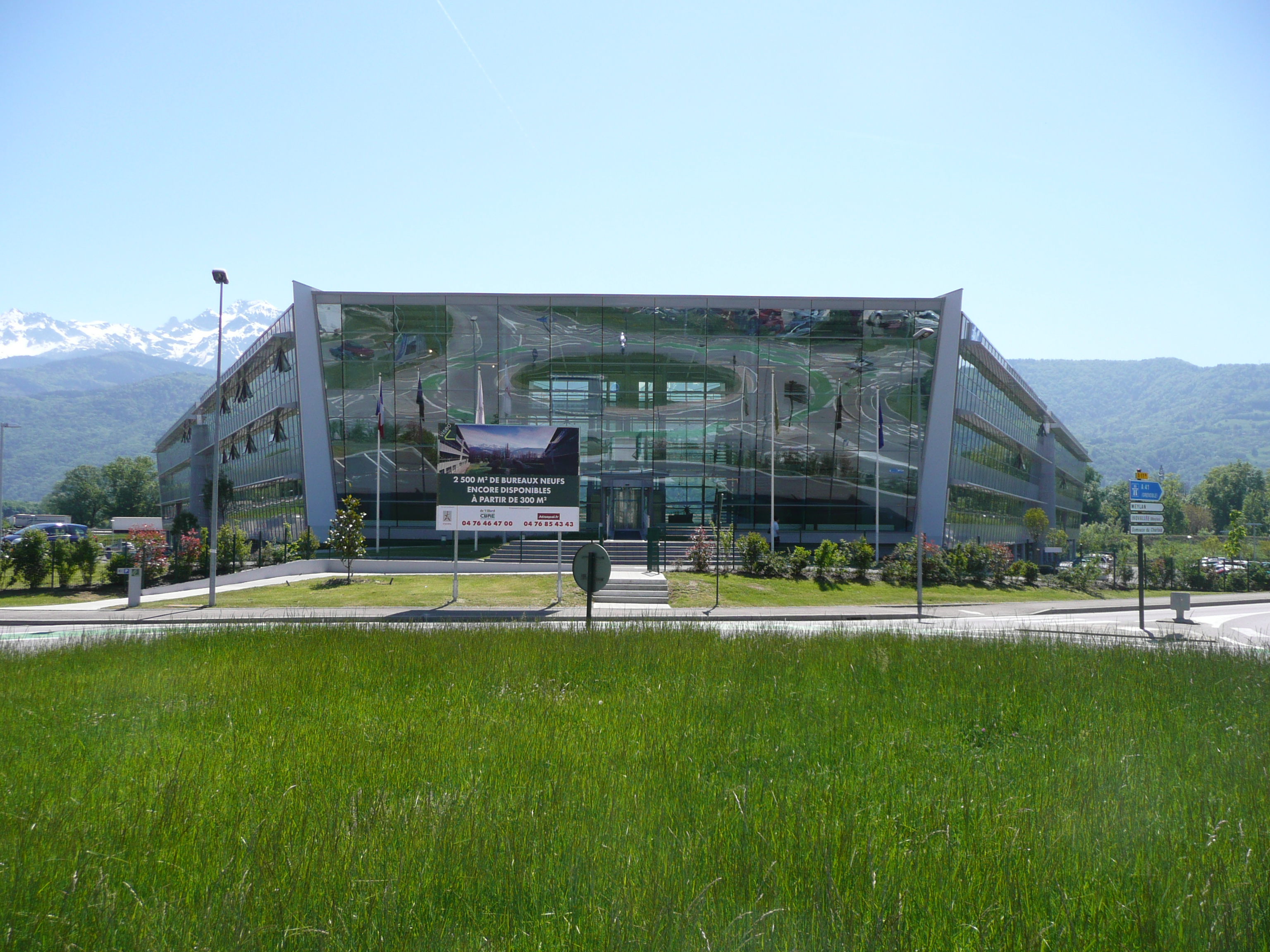 Immeuble de Bureau à Inovallée, Montbonnot, France